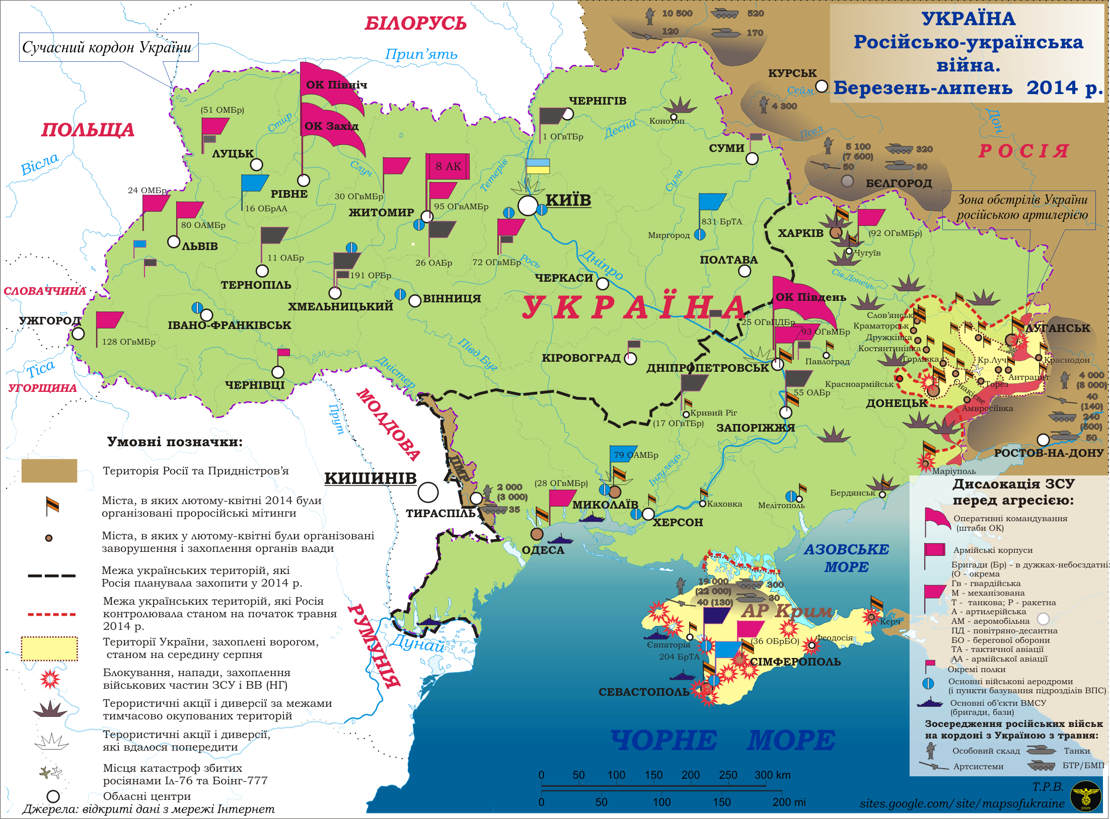 Російсько-українська війна 2014 р. - карта (станом на серпень)